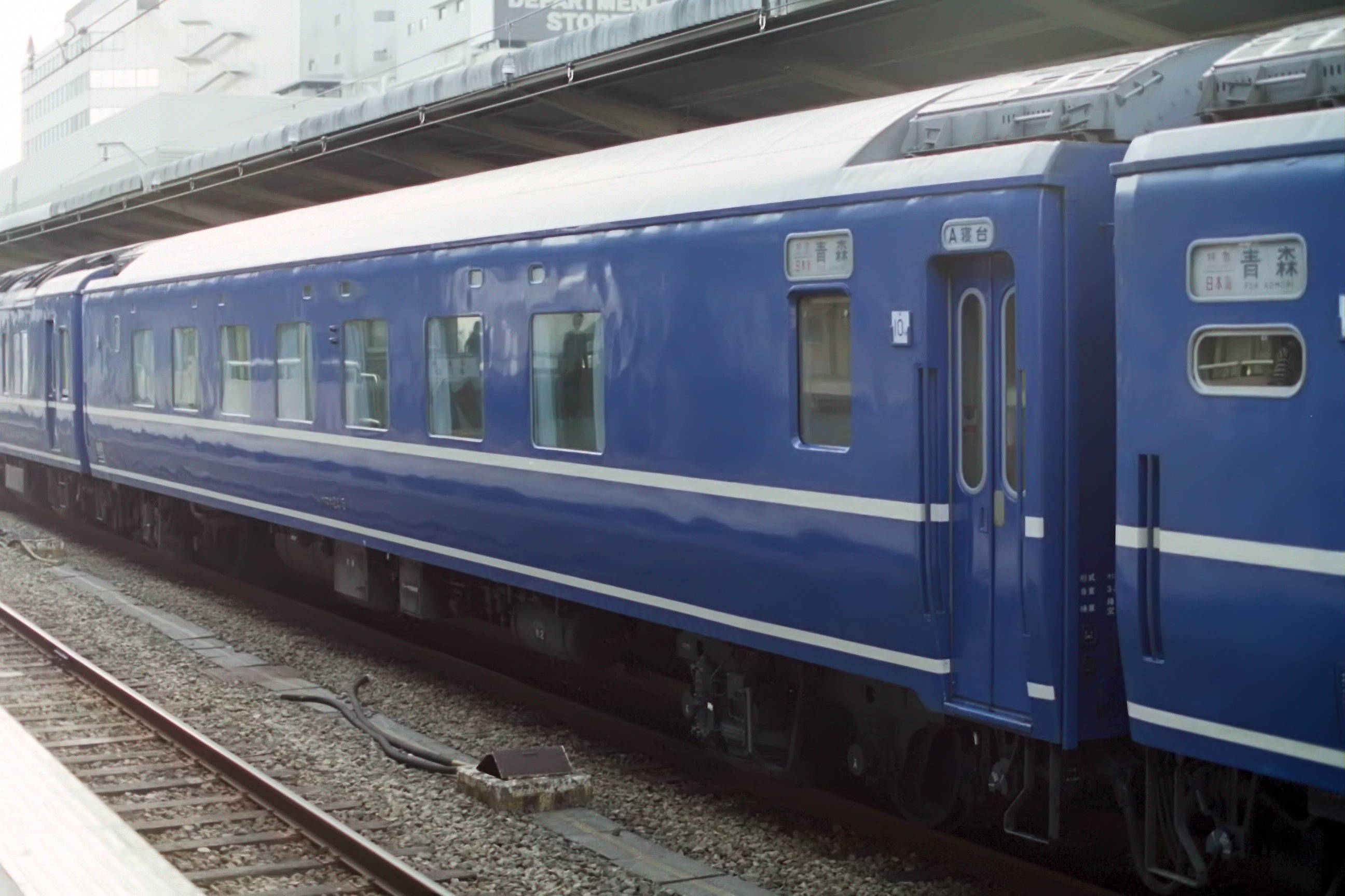 オロネ24 5 大阪駅